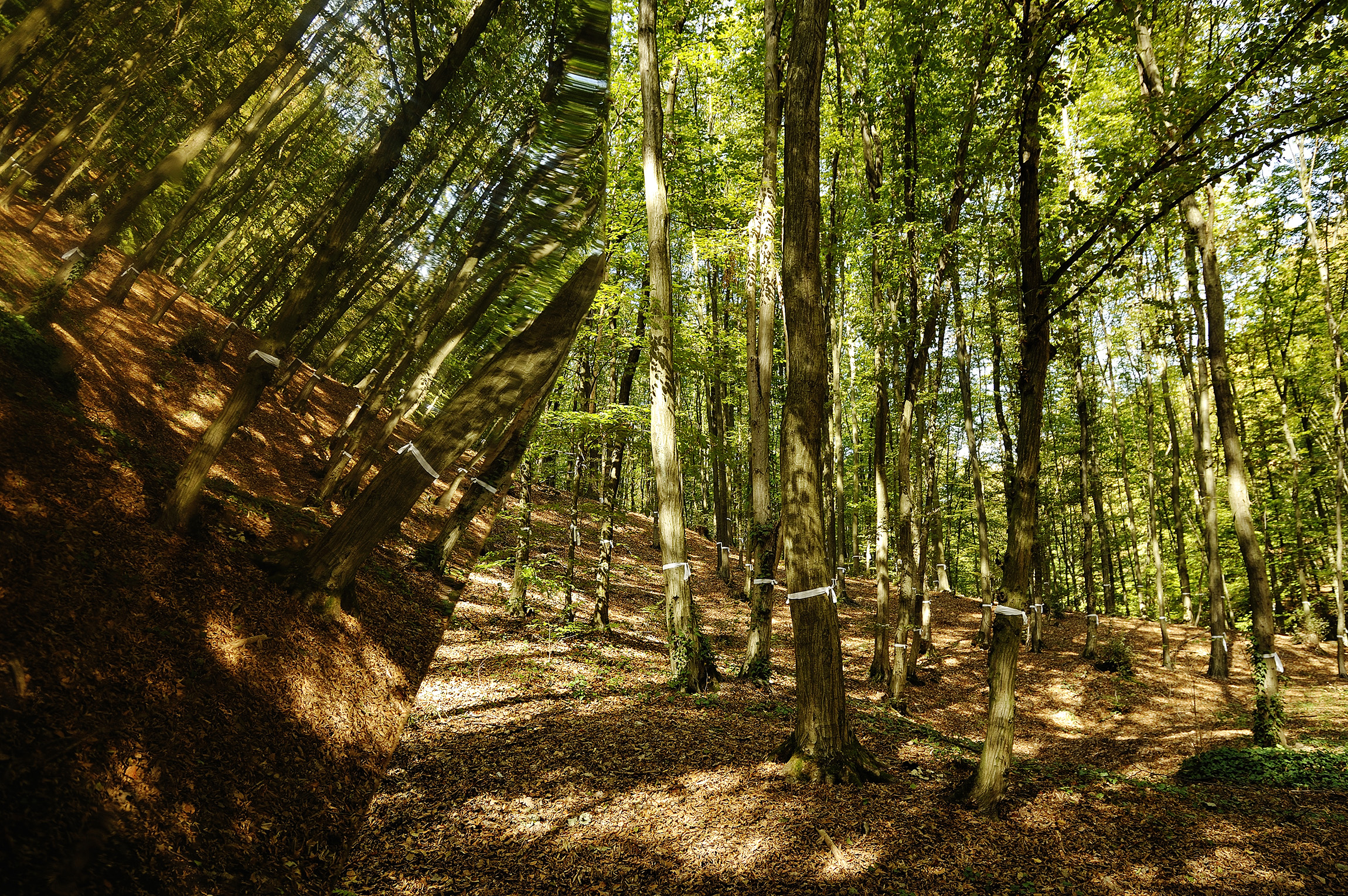 Mjesto povijesnih događaja -kompleks šume Dotrščina, Z-1527, umjetnička intervencija 2012.g.